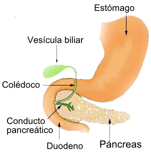 Relacions del pàncrees